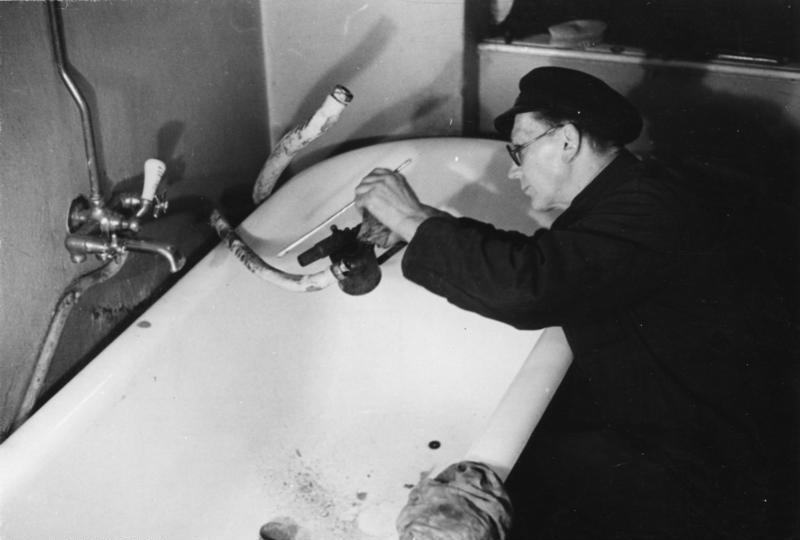 Berlin, Klempner bei der Arbeit Berlin, April 1947 Beseitigung von Rohrbrüchen Langsam werden die Frostschäden des Winters beseitigt Aufnahme: Krueger, Erich O. 516-47 [Berlin.- Klempner bei der Behebung eines Rohrbruchs vor einer Badewanne.]